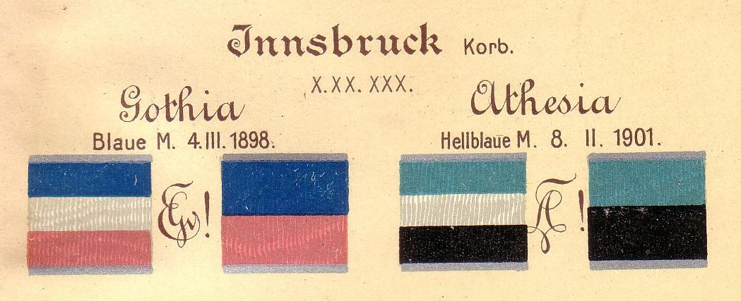 Couleur und Zirkel der beiden ersten Innsbrucker Corps